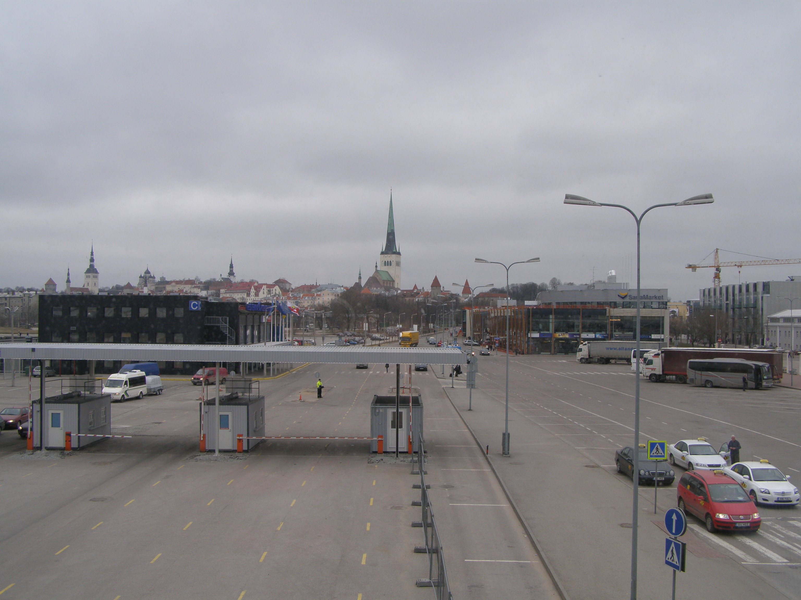 Вид на город от пристани